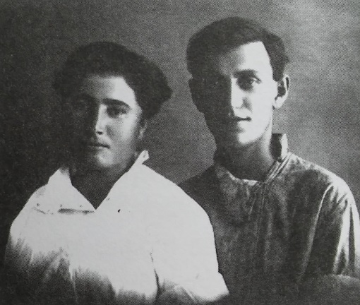 יוסף חריט וצביה אברמסון חריט - 1924